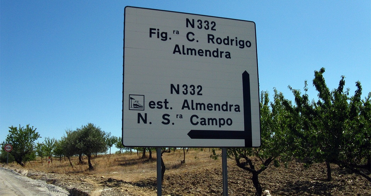 Placa com indicação para a estação de Almendra. A ironia? Esta placa foi colocada 20 anos após o fecho da estação